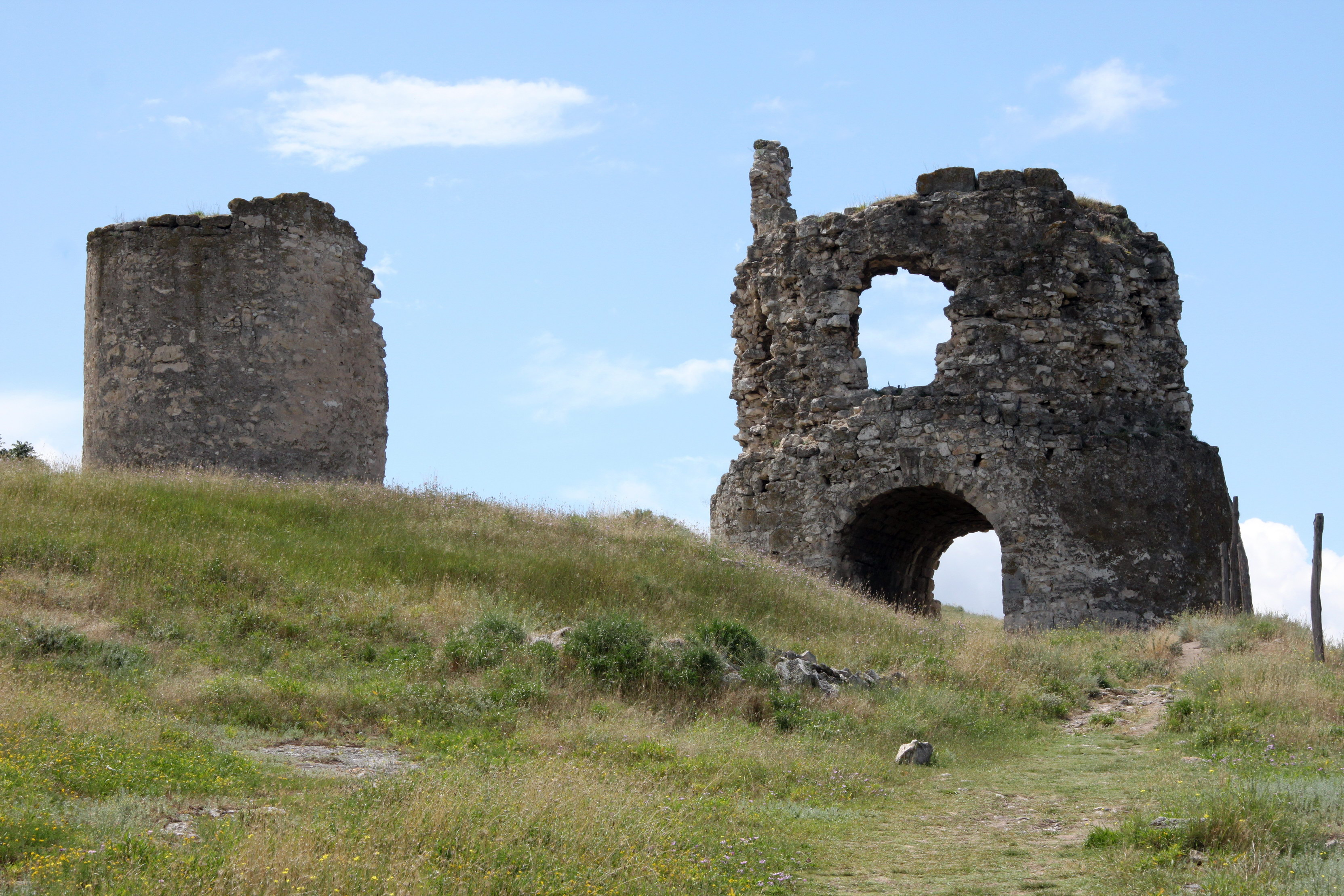 Фортеця Каламіта, м. Інкерман